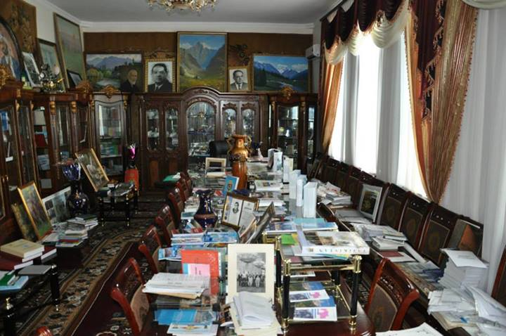 Музей академика Бободжана Гафурова г. Гафуров, Согдийская область, Таджикистан.Тоҷикӣ: Осорхонаи академик Б. Ғафуров. ш. Ғафуров, вилояти Суғд,Тоҷикистон